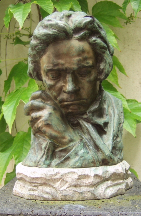 Pierre-Felix Masseau: Beethoven (1902) – Garten des Beethovenhauses in Bonn